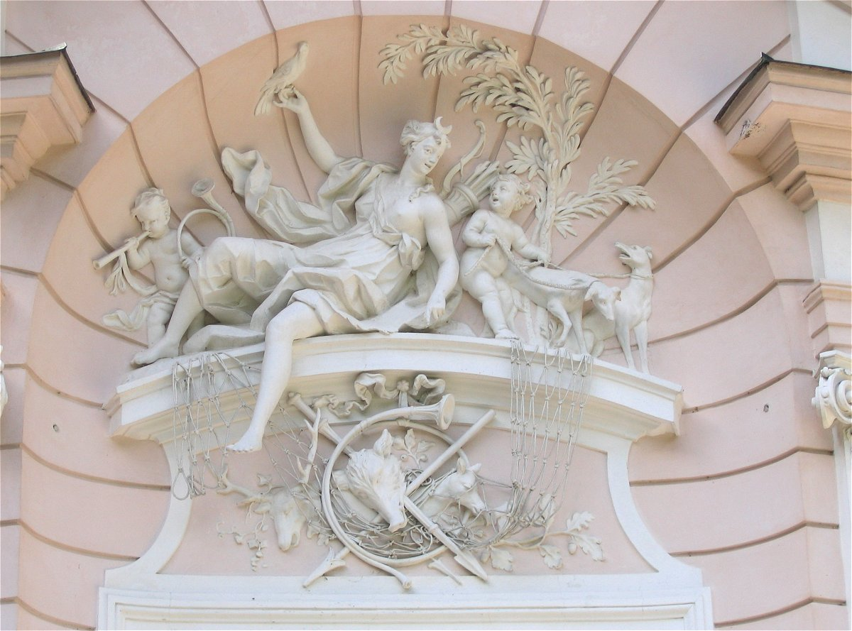 Amalienburg im Schlosspark Nymphenburg, Detail Ostseite